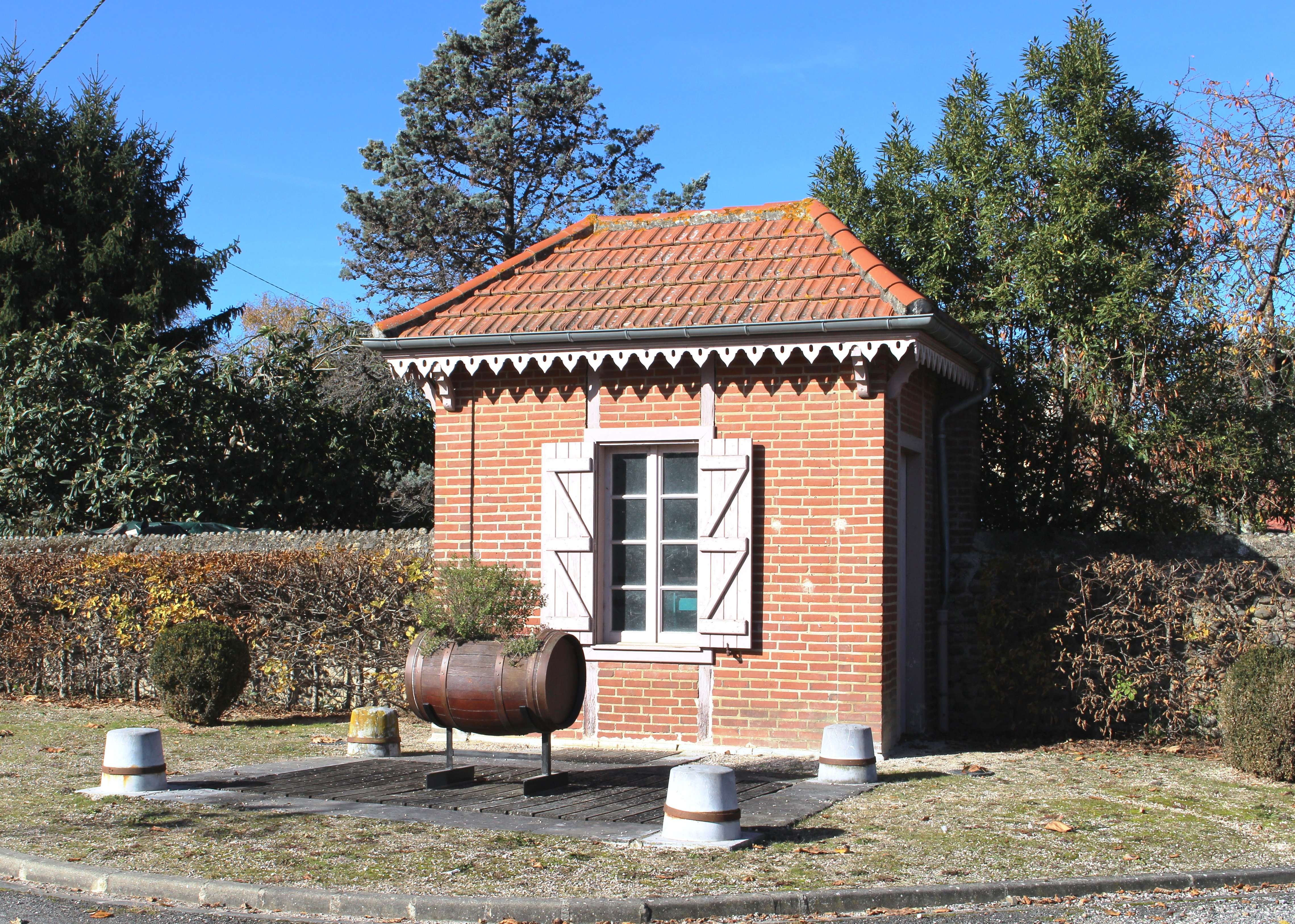 Bascule de Caixon (Hautes-Pyrénées)